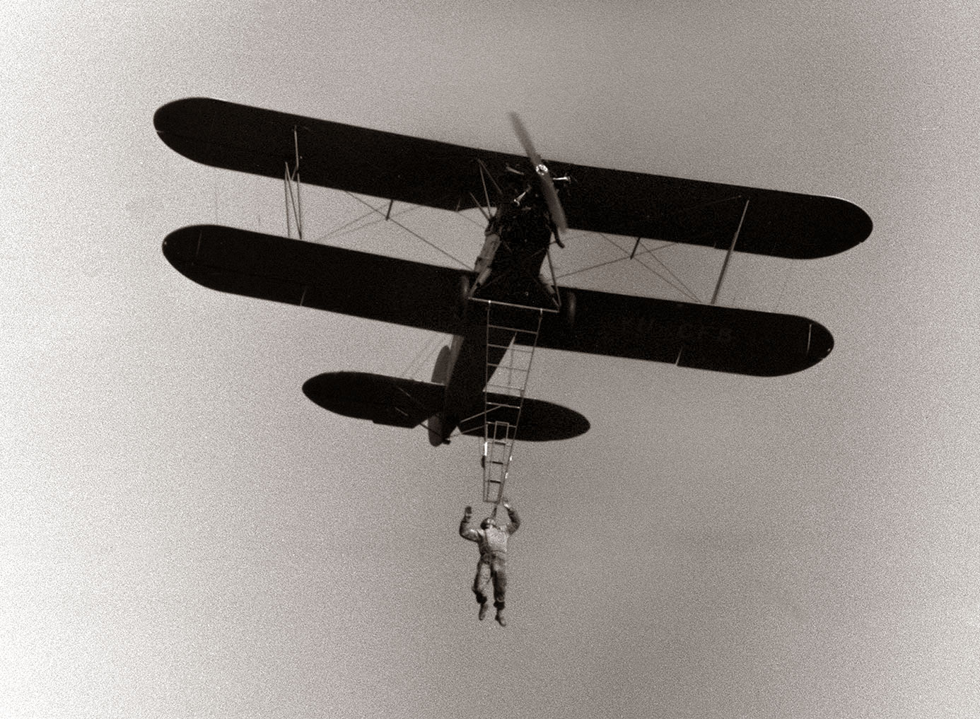 Akrobat Dragoljub Aleksič nad Dravo